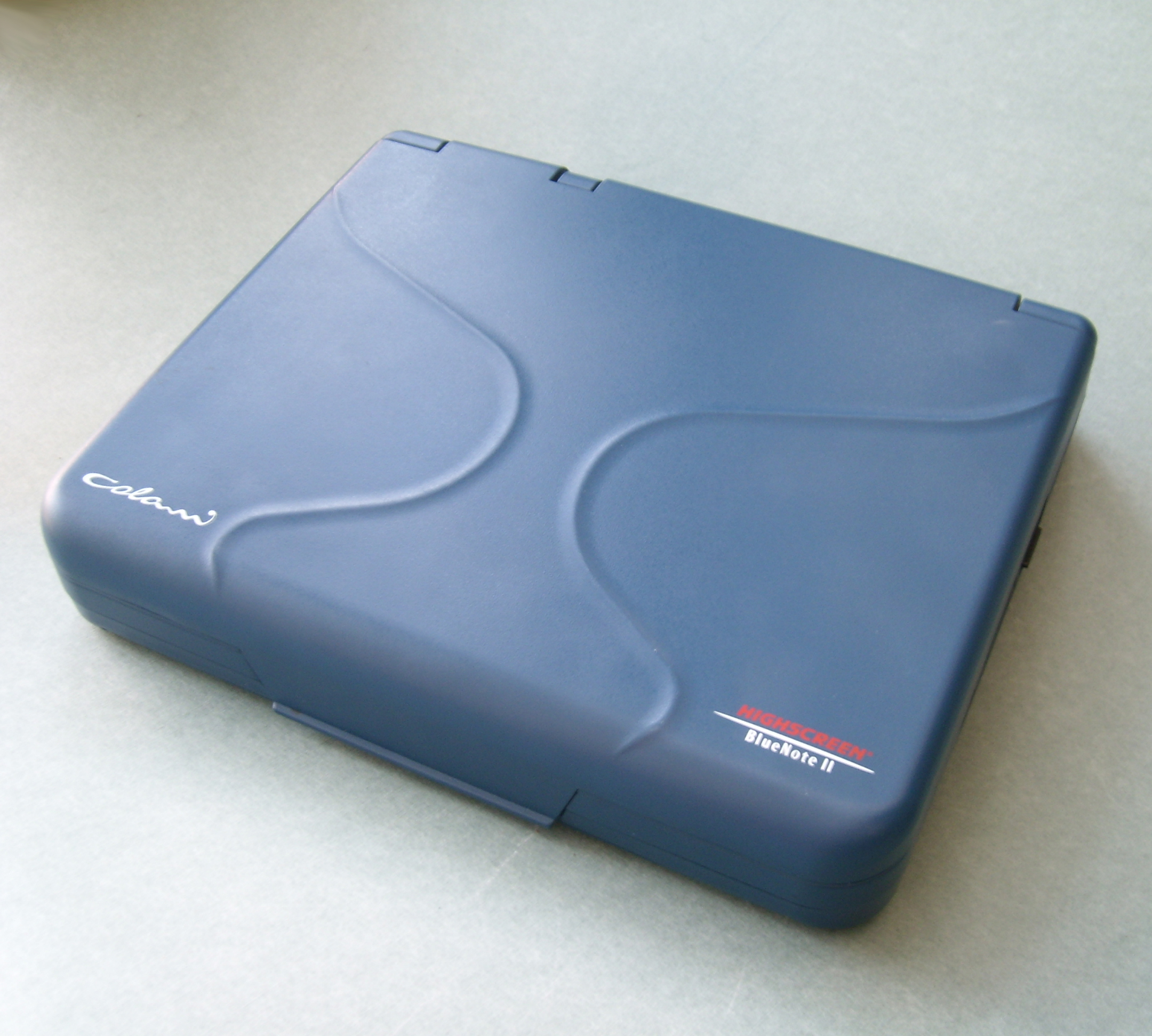 Colani Notebook "Blue note II" von Highscreen